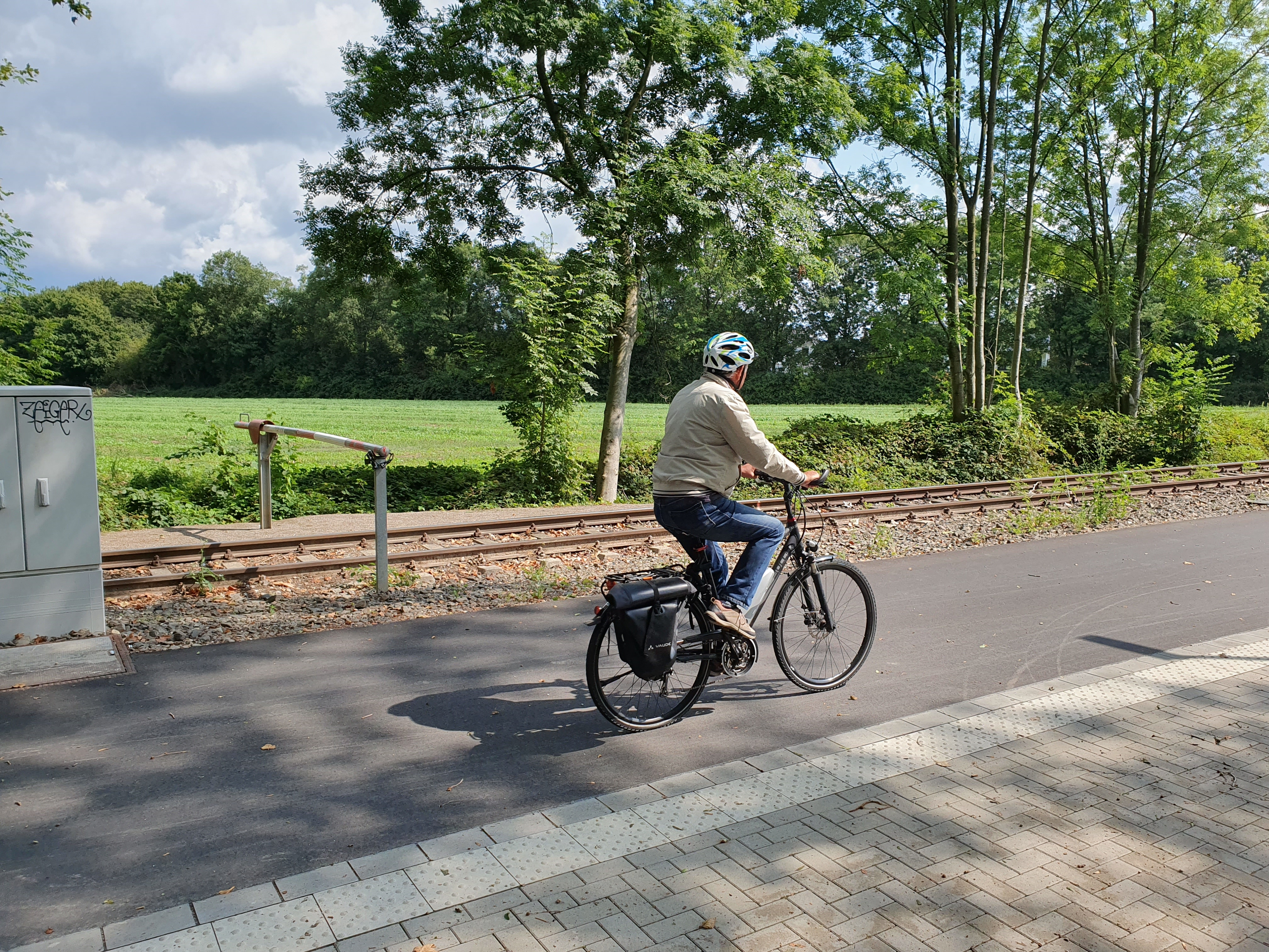 Radfahrer auf Europa-Radbahzn